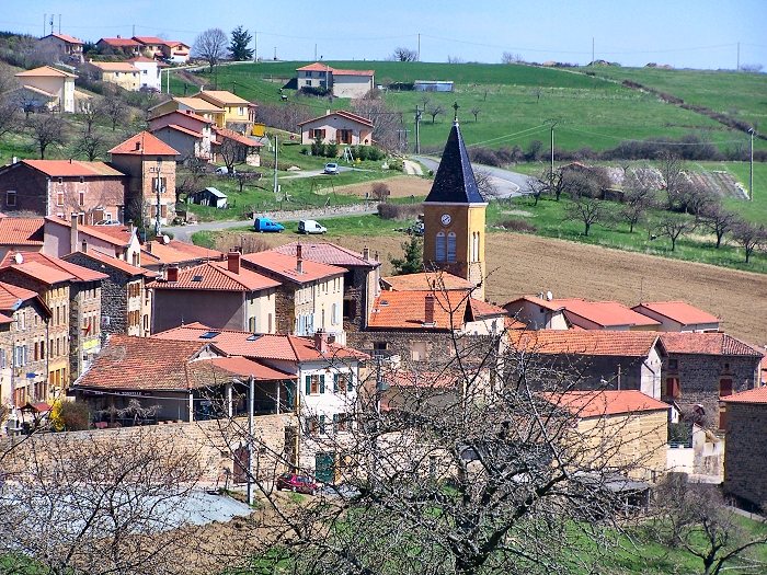 Vue sur Saint-Julien-sur-Bibost